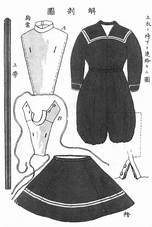 井口あくりが考案した運動服